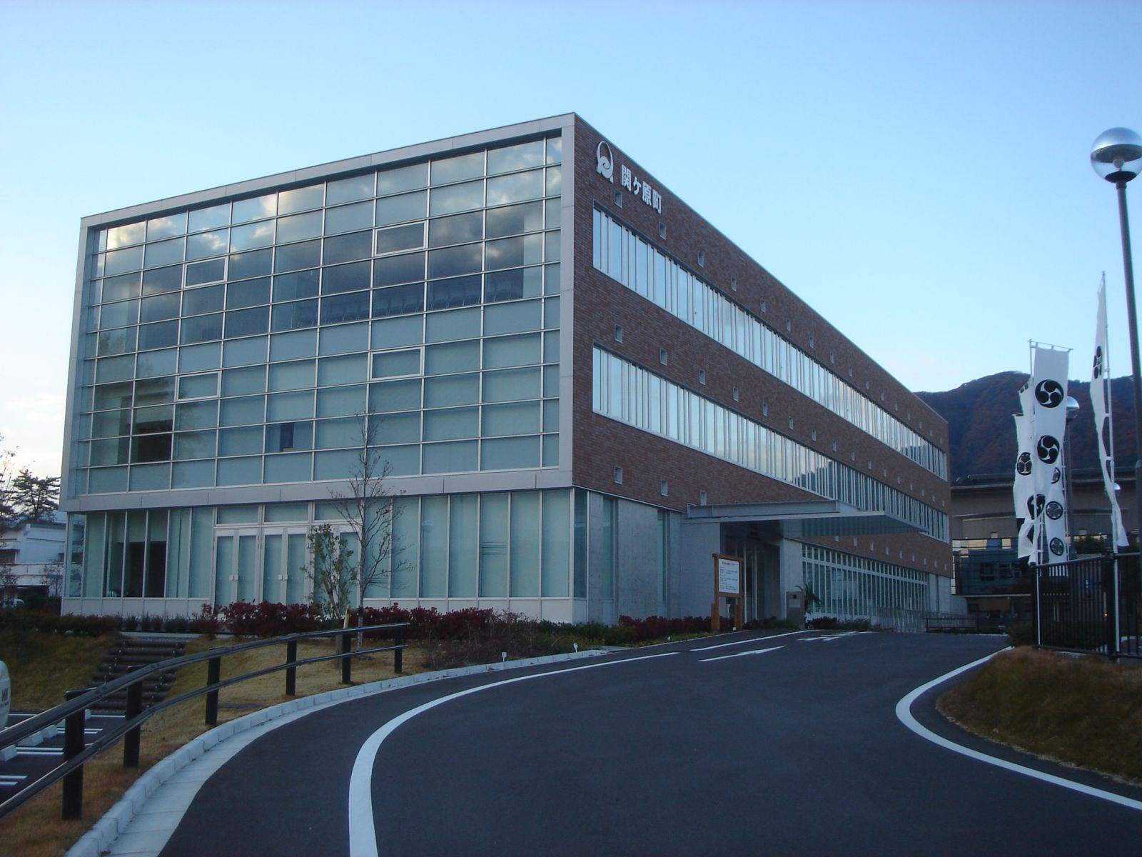 Sekigahara Town Hall（関ケ原町役場）,Sekigahara,Gifu,Japan(岐阜県関ケ原町)で撮影。